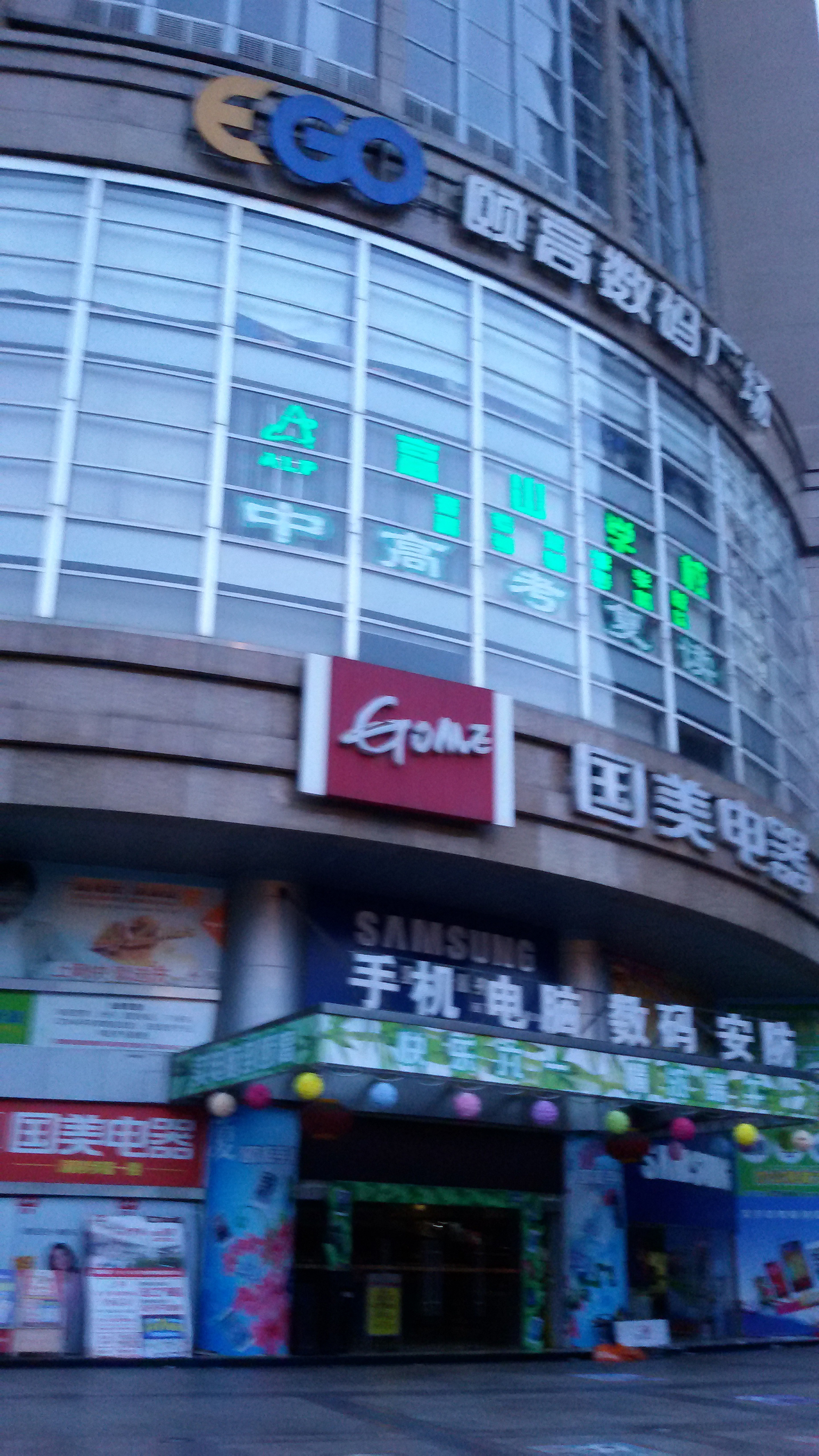 粵語: 越秀新都會